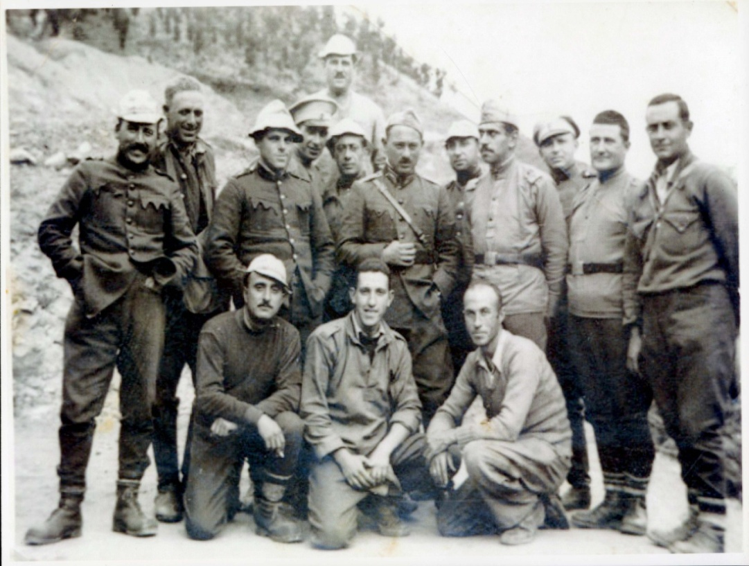 В трудов лагер